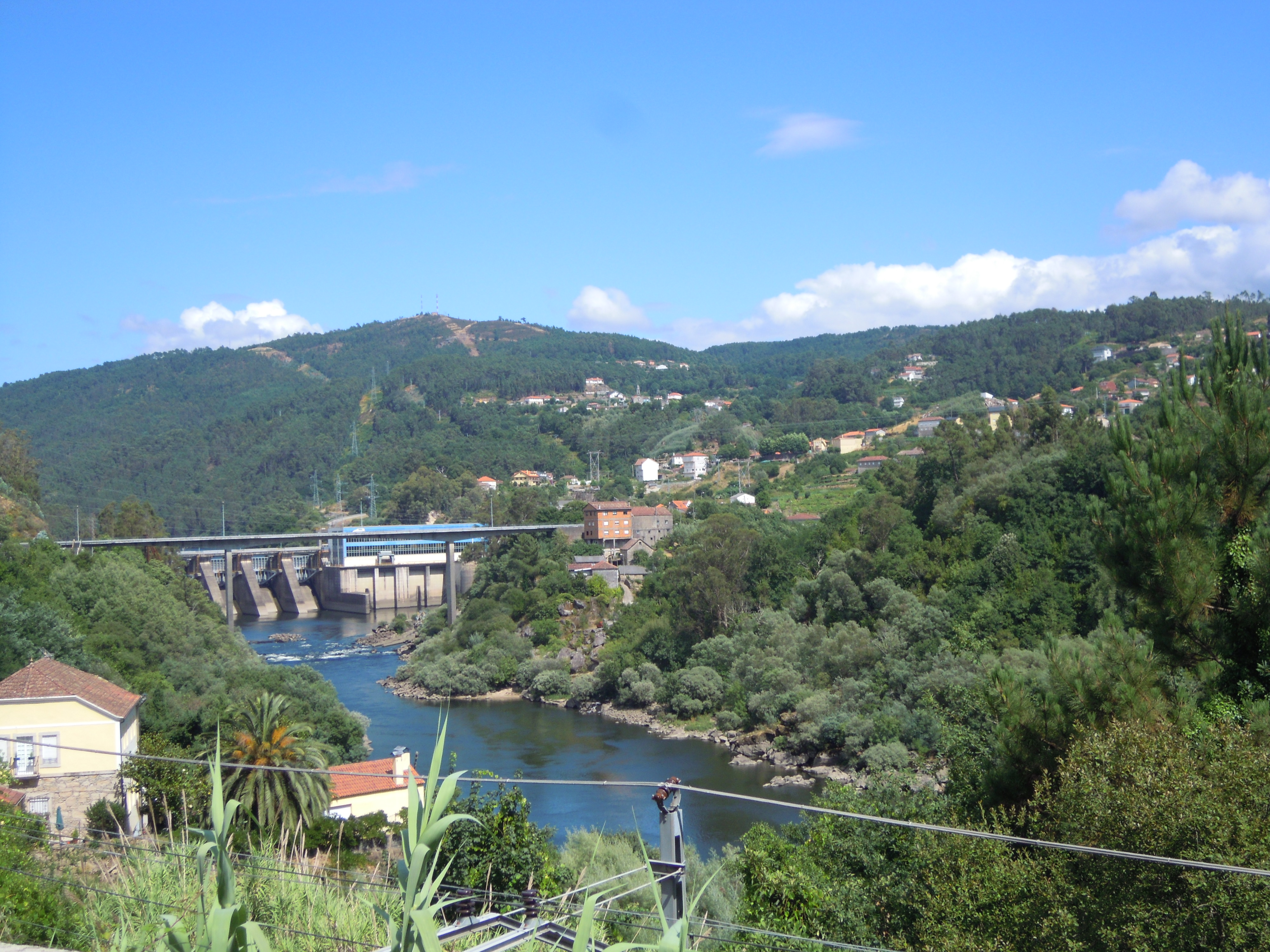 Encoro da Frieira, no río Miño, desde A Frieira (Crecente) Categoría:Imaxes de Quintela Categoría:Imaxes do río Miño Categoría:Imaxes de encoros de Galicia Categoría:Imaxes de Desteriz